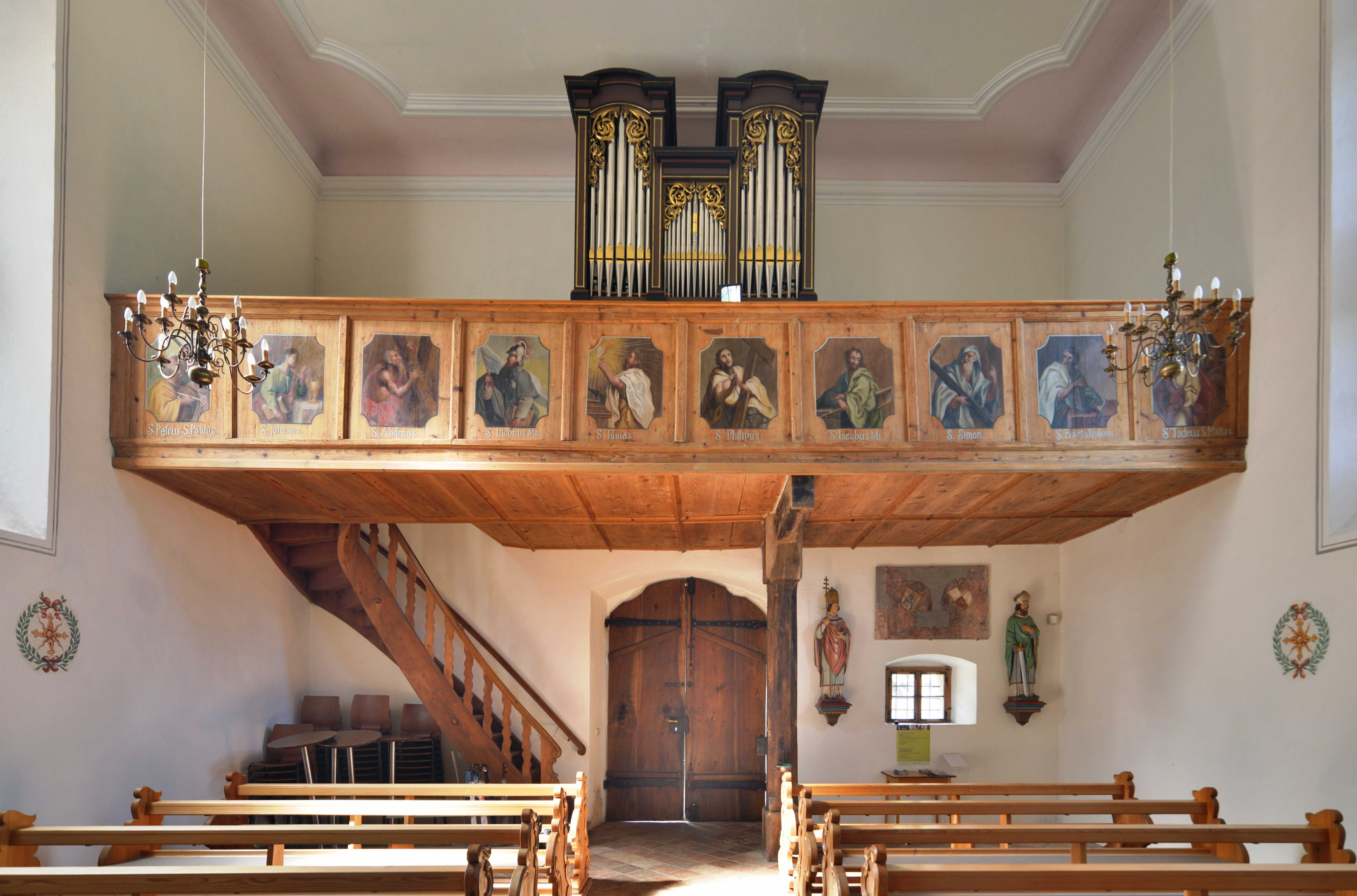 Alte Pfarrkirche Hll. Cornelius und Cyprian, in Tosters bei Feldkirch in Vorarlberg.